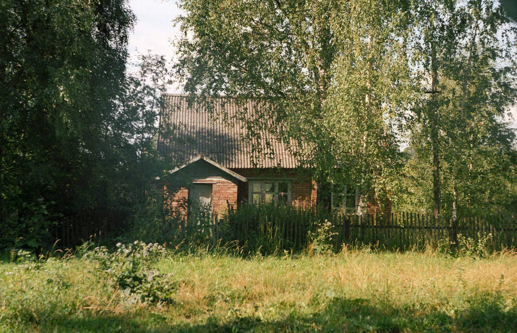 Клуб в д. Бухарино (снято в 2002 г.)